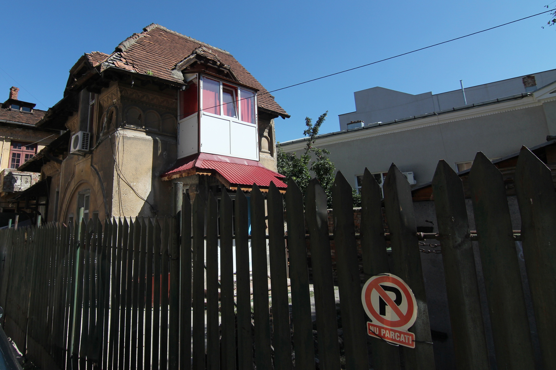 Casă pe Calea Călărașilor